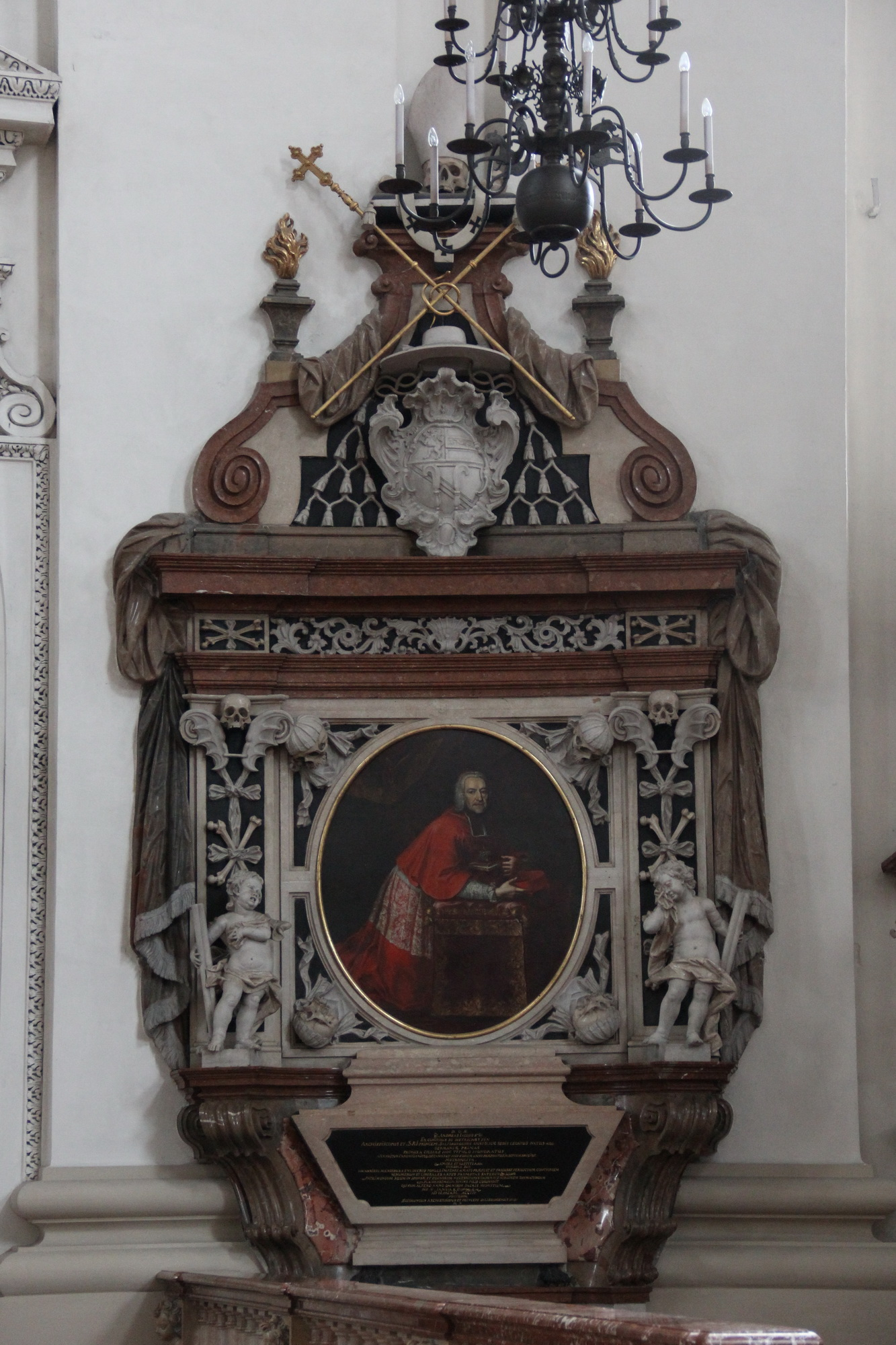 Salzburg Cathedral - cenotaph Archbishop Andreas Jakob von Dietrichstein